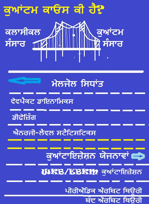 ਪੰਜਾਬੀ: ਕੁਆਂਟਮ ਮਕੈਨਿਕਸ ਅਤੇ ਕਲਾਸੀਕਲ ਮਕੈਨਿਕਸ ਦੀਆਂ ਥਿਊਰੀਆਂ ਦਰਮਿਆਨ ਪੁਲ ਬਣਾਉਣ ਦੇ ਯਤਨਾਂ ਵਾਲੇ ਭੌਤਿਕ ਵਿਗਿਆਨ ਦੇ ਖੇਤਰ ਨੂੰ ਕੁਆਂਟਮ ਕਾਓਸ ਕਹਿੰਦੇ ਹਨ। ਚਿੱਤਰ ਵਿੱਚ ਹਰੇਕ ਦਿਸ਼ਾ ਅੰਦਰ ਚੱਲ ਰਹੇ ਮੁੱਖ ਵਿਚਾਰਾਂ ਨੂੰ ਦਿਖਾਇਆ ਗਿਆ ਹੈ।